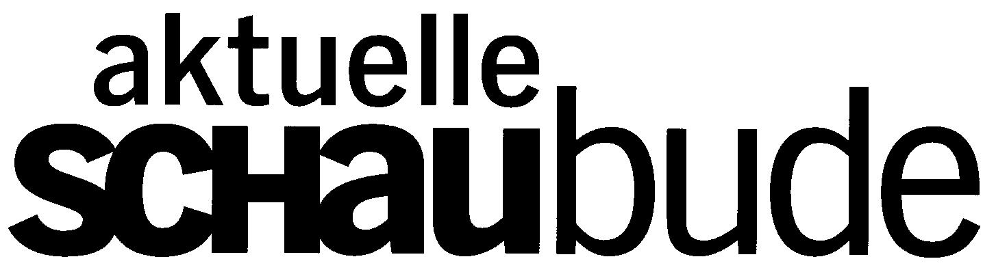 Logo der Fernsehsendung Aktuelle Schaubude seit 2002